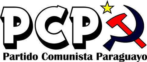 PCP logo